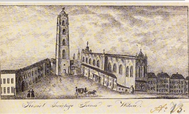 Беларуская (тарашкевіца): Вільня (Vilnia), вуліца Сьвятаянская (vulica Śviatajanskaja). Касьцёл Сьвятых Яна Хрысьціцеля і Яна Апостала і Эвангеліста